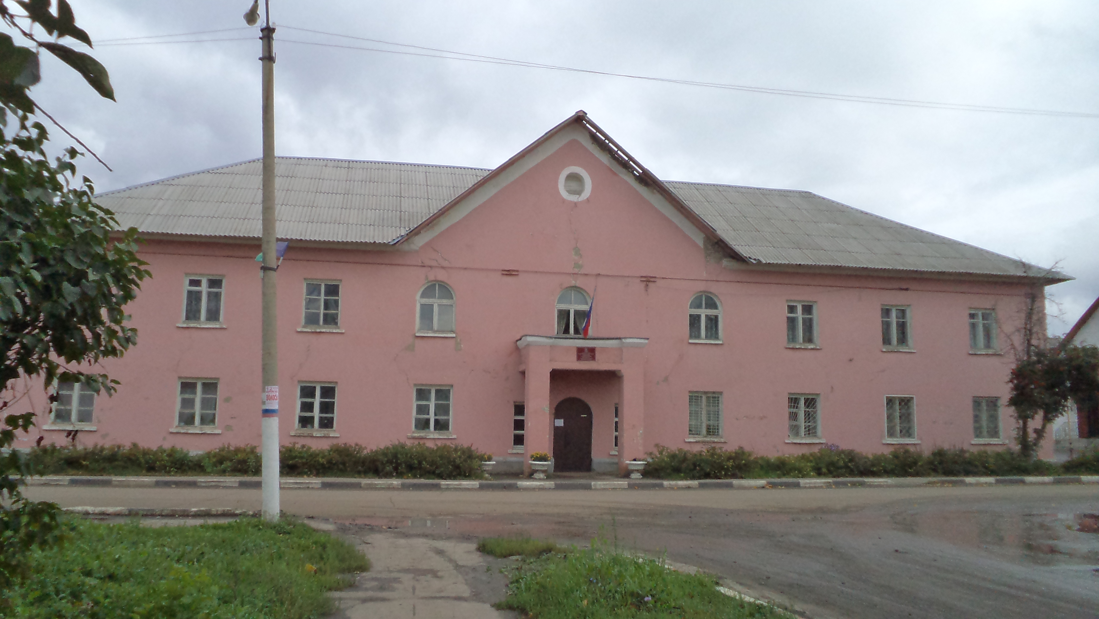 Здание администрации Кораблинского городского поселения